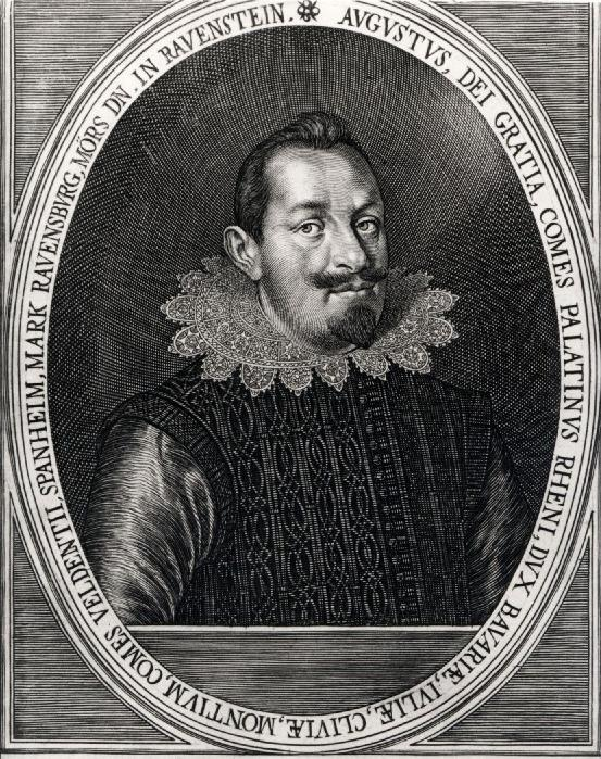 Pfalzgraf August, Kupferstich von Lucas Kilianus (1579-1637), 1621.